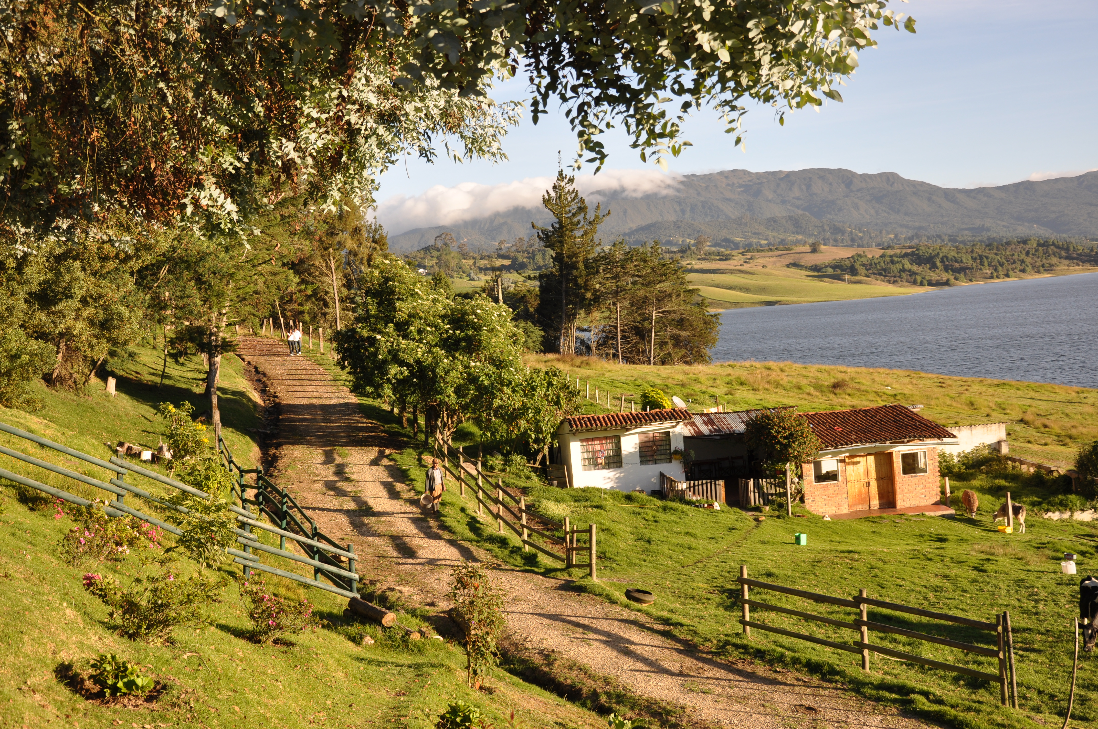 back to nyc 005